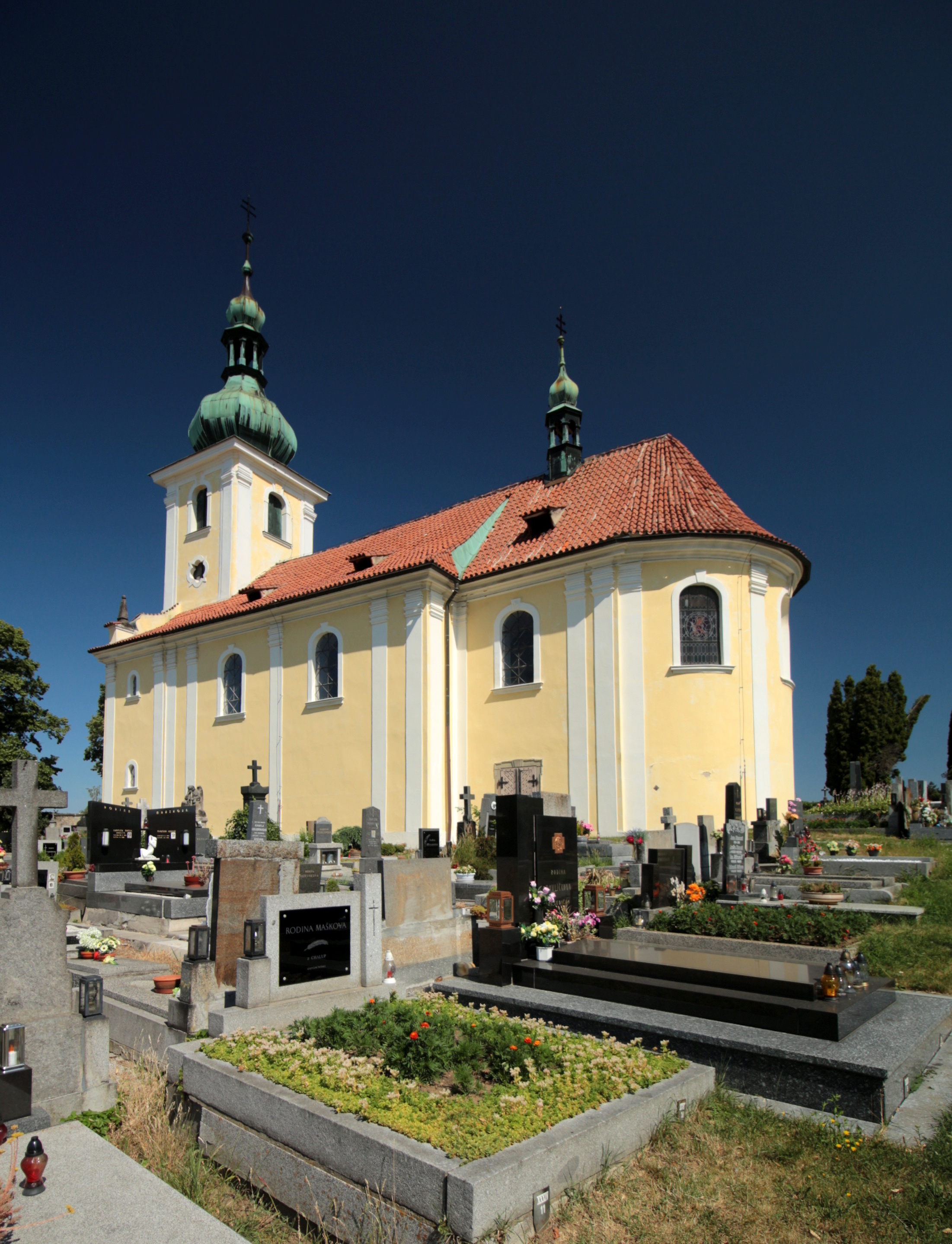 Sedlčany, kostel Nanebevzetí Panny Marie